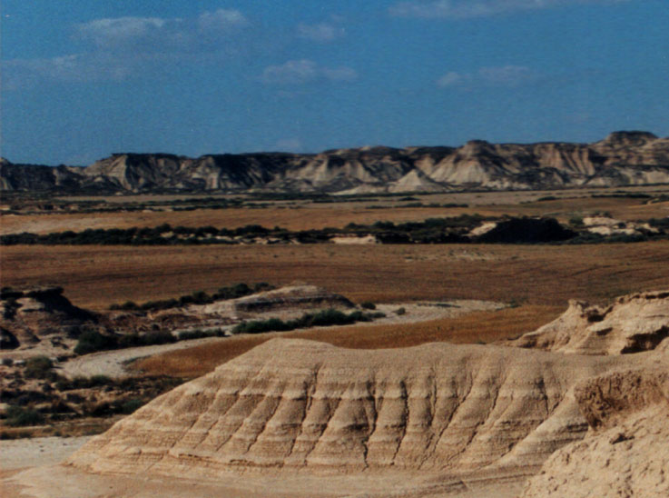 Bardenas Reales, Navarra, Spain